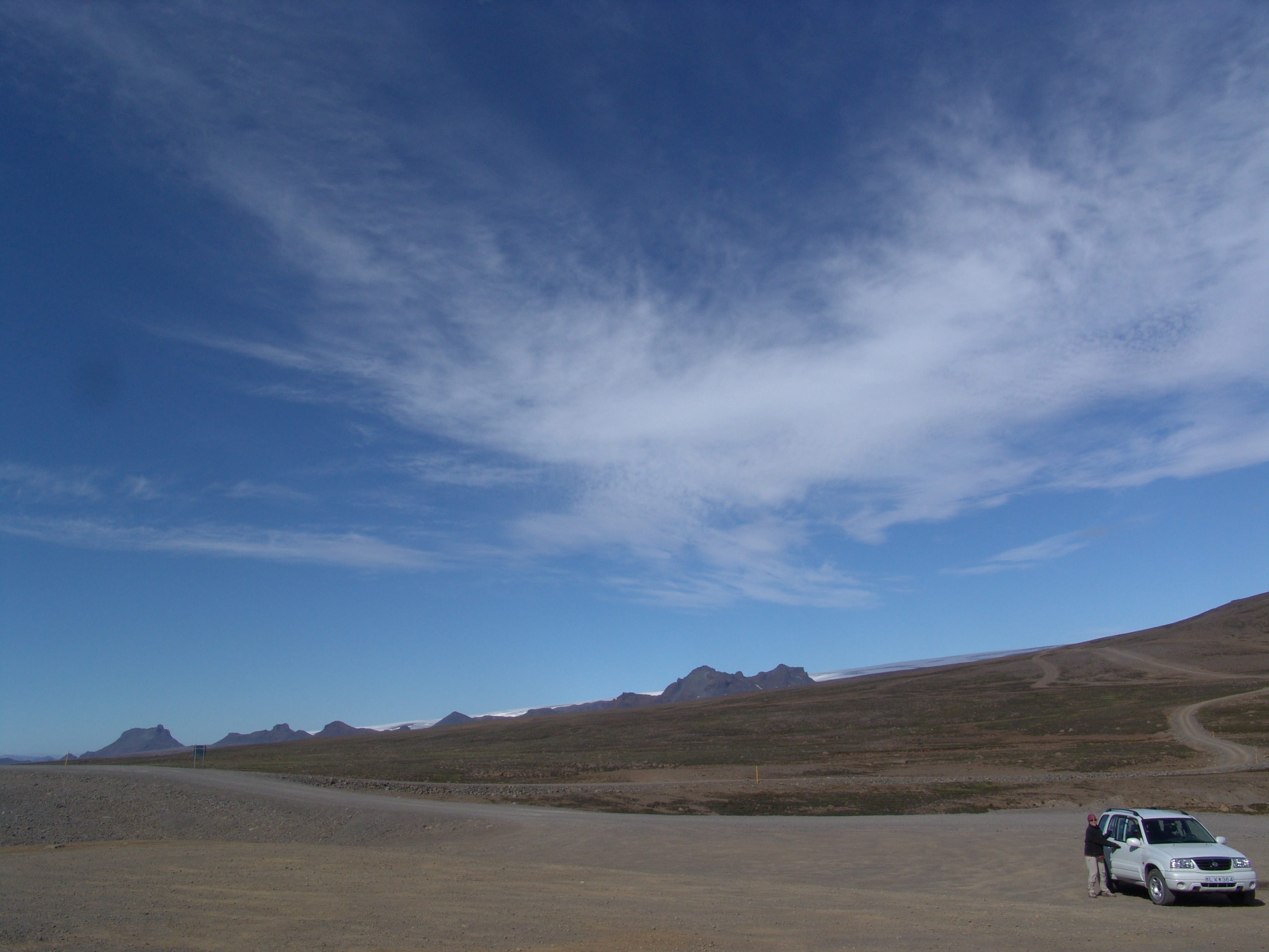 Island, Landschaft.